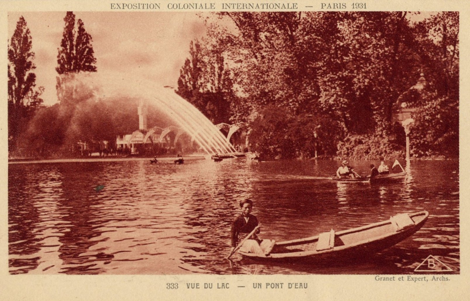 Le lac Daumesnil à l'Exposition Coloniale de Paris en 1931